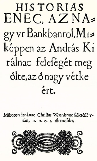 A mű első közlése.